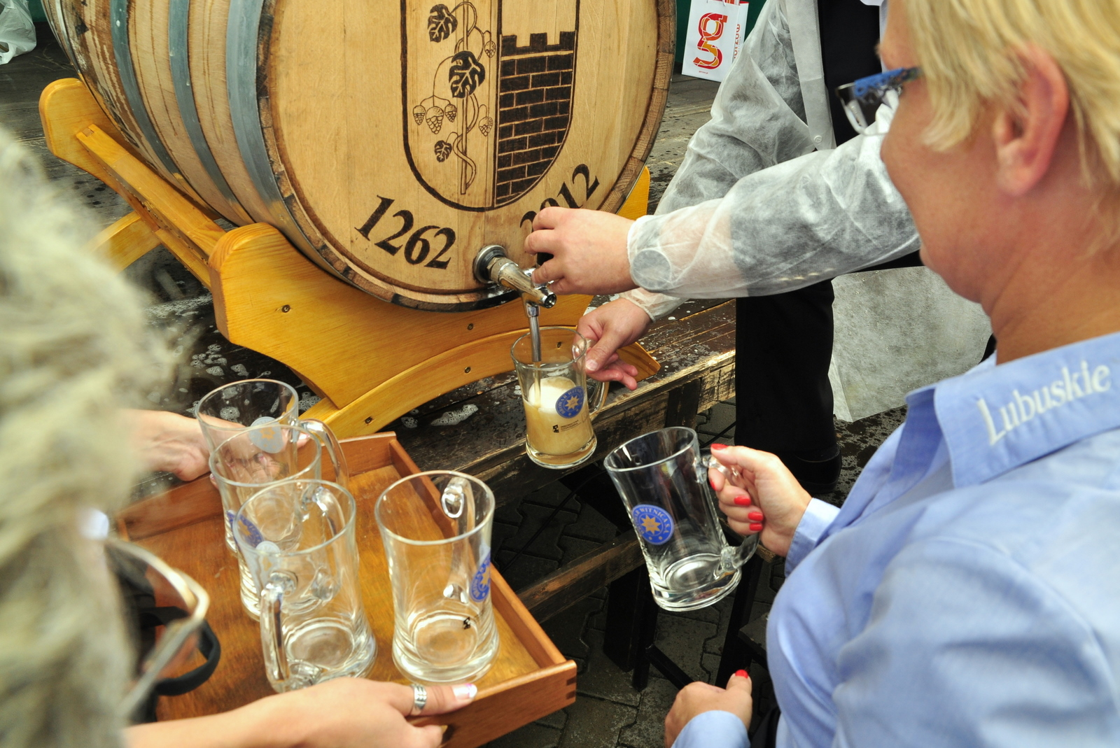 "Lubuskie pszeniczne" - degustacja ( Lubuskie Kulinaria Regionalne 2012 r.)